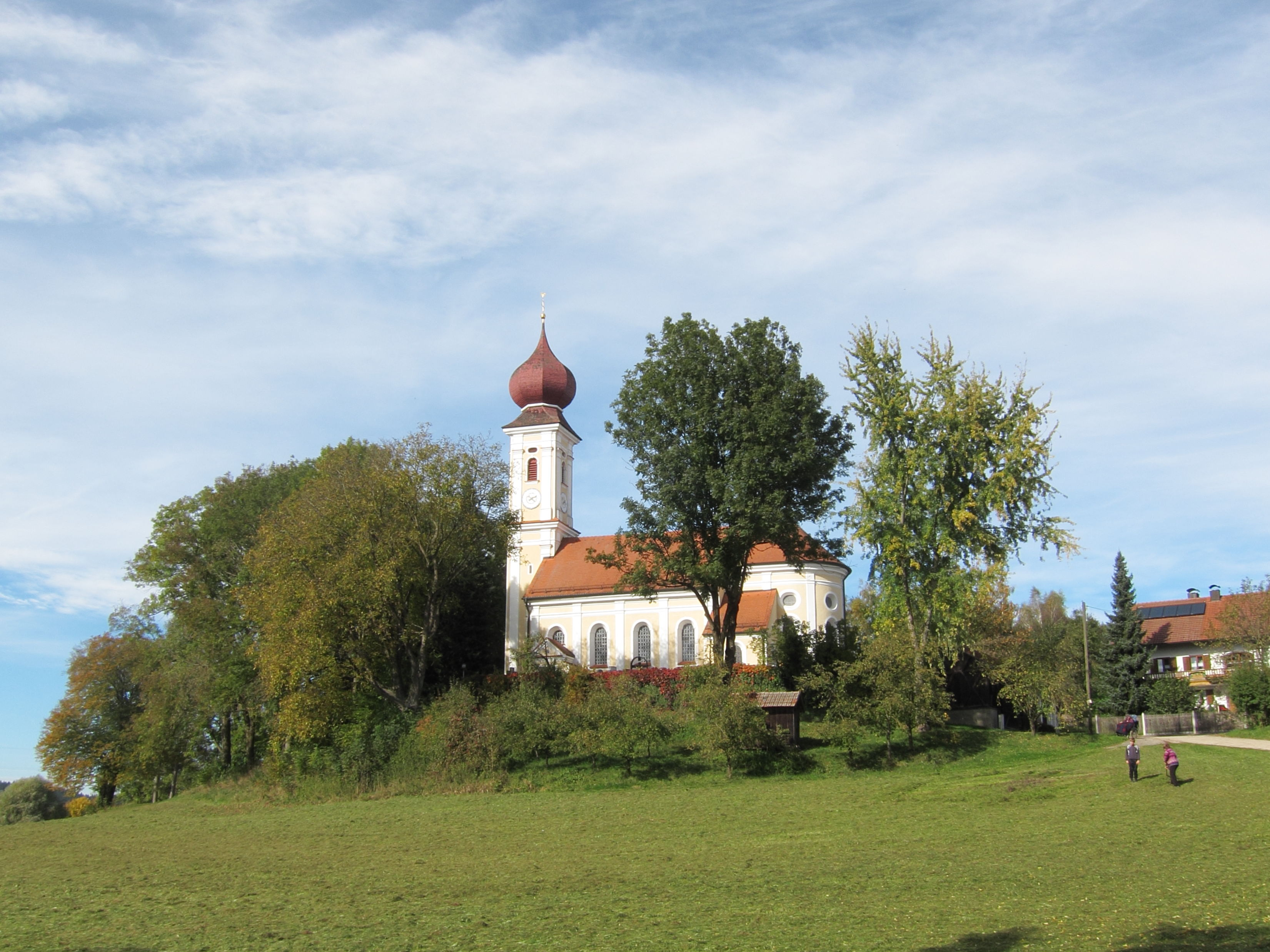 Kirchberg; katholische Filialkirche St. Peter und Paul, Saalbau mit eingezogenem halbrundem Chor, Zwiebelturm und angefügter Sakristei, Neubau von Anton Kogler, 1728-30; mit Ausstattung.